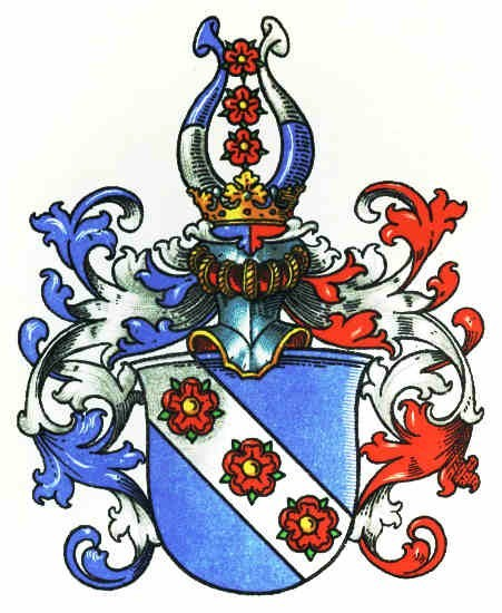 Wappen der Familie von Koschembahr.